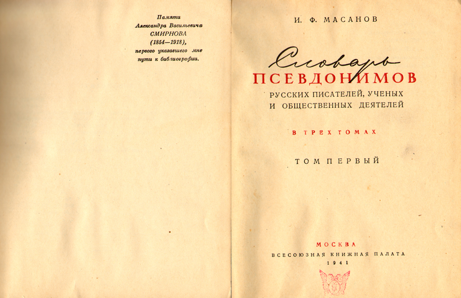 Страницы первого тома словаря И. Ф. Масанова